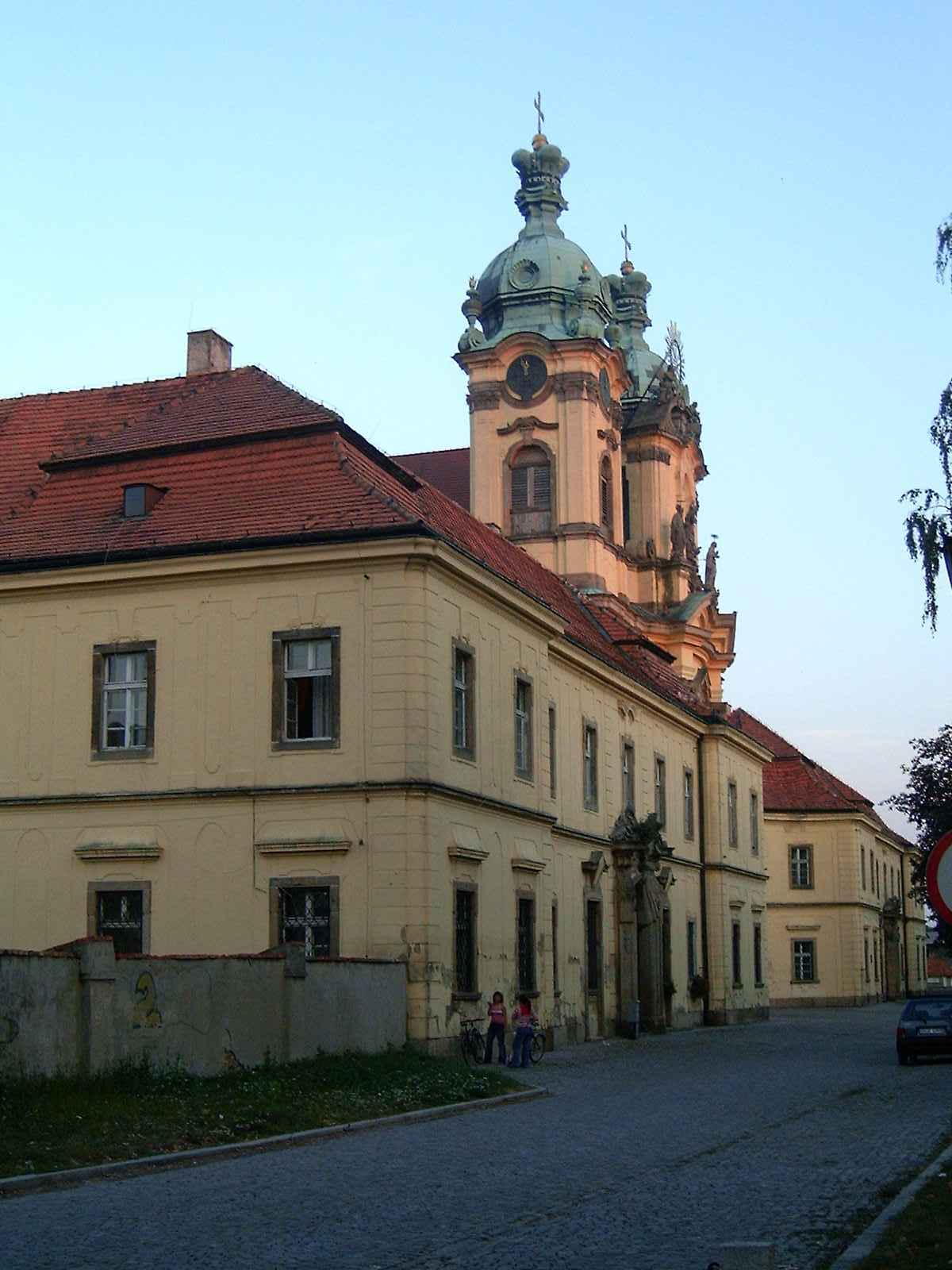 Legnickie Pole - barokowy kościół pw św. Jadwigi z dawnym klasztorem Benedyktynów